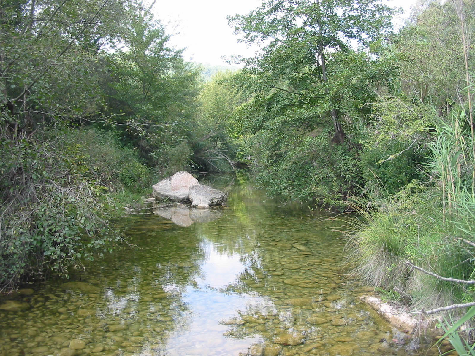 Riu Manol